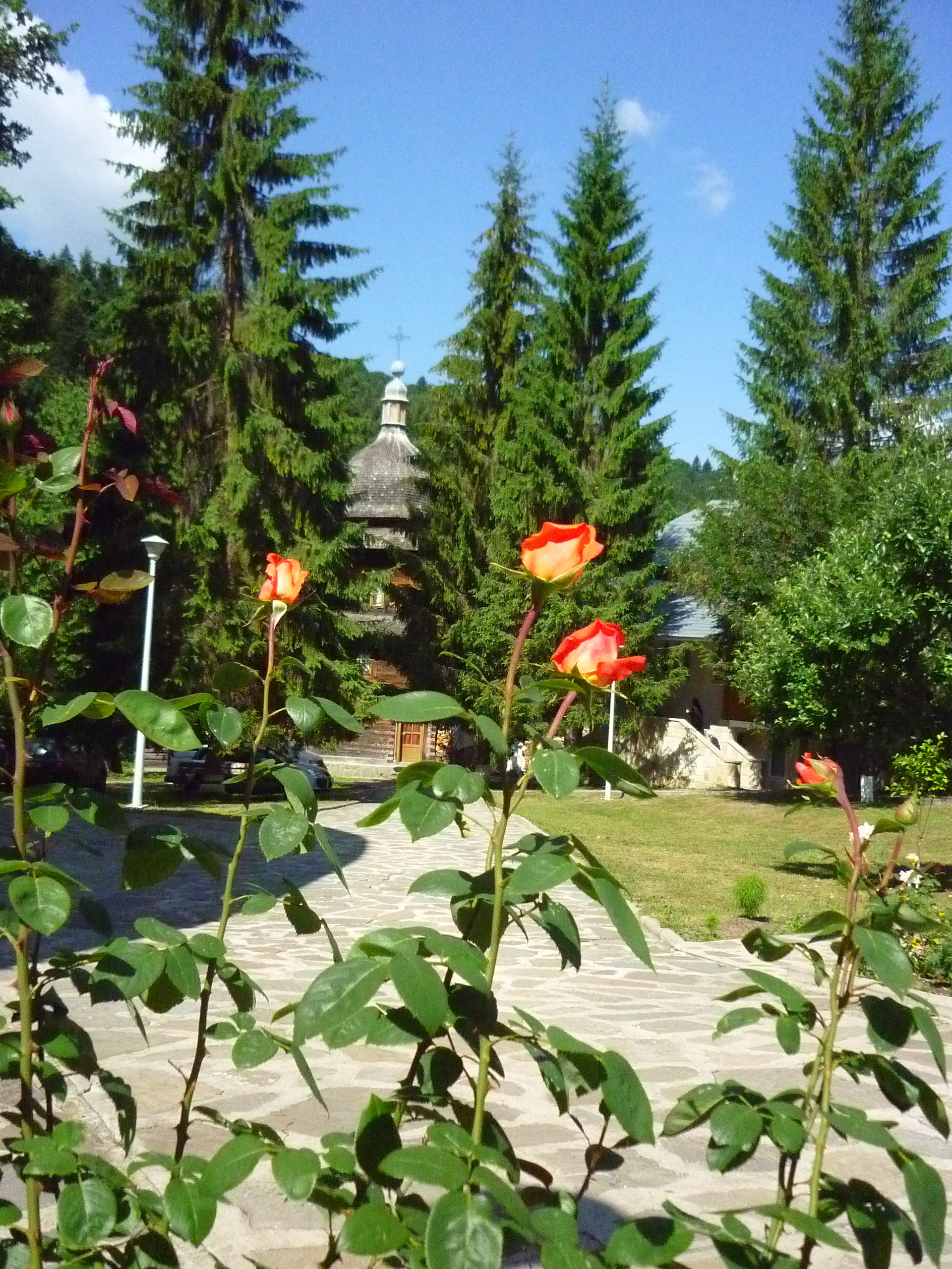 Clopotnița de lemn a mănăstirii datează din perioada 1830 - 1835. 06